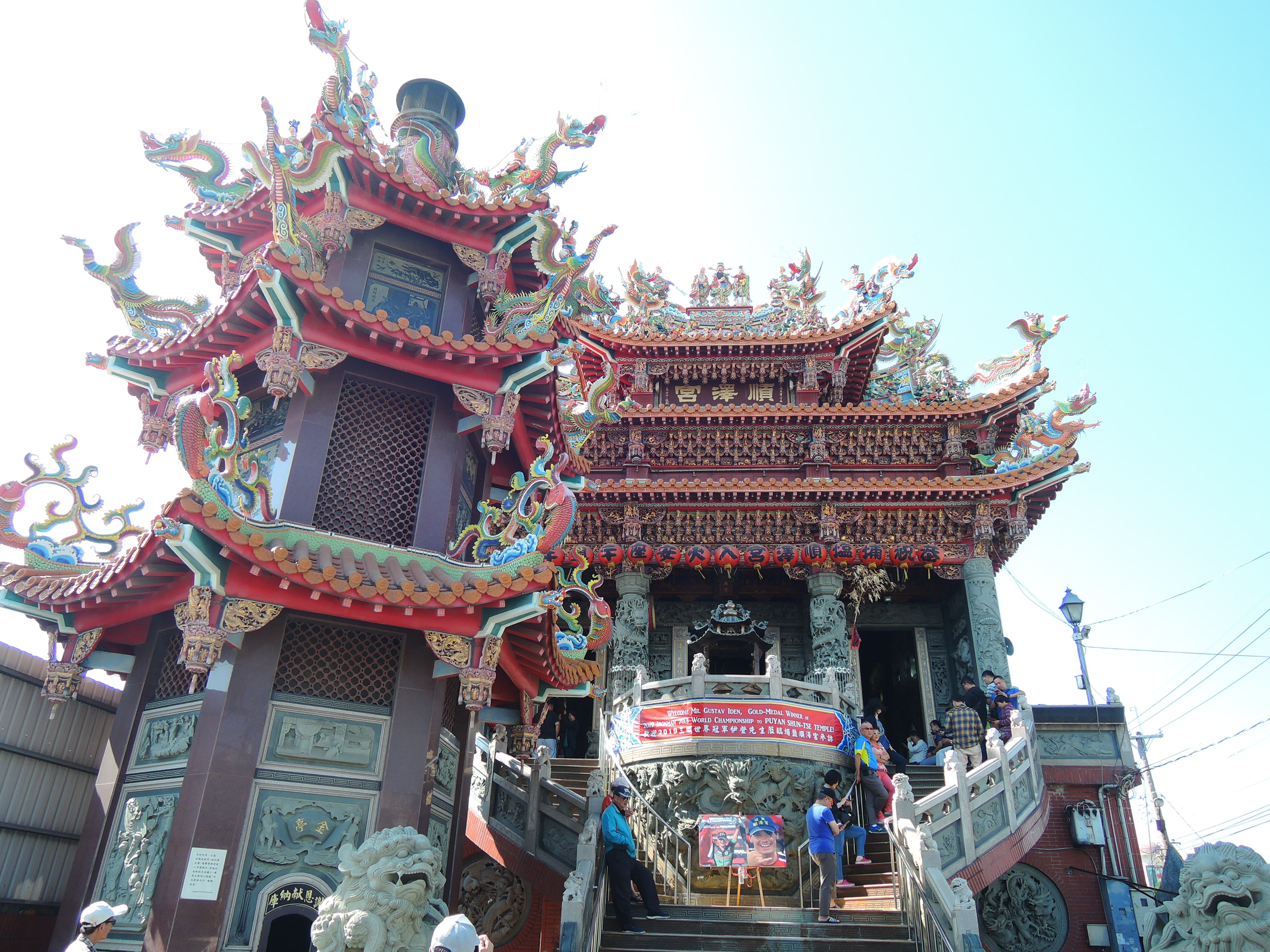 位於台灣彰化縣埔鹽鄉埔鹽村中正路55號